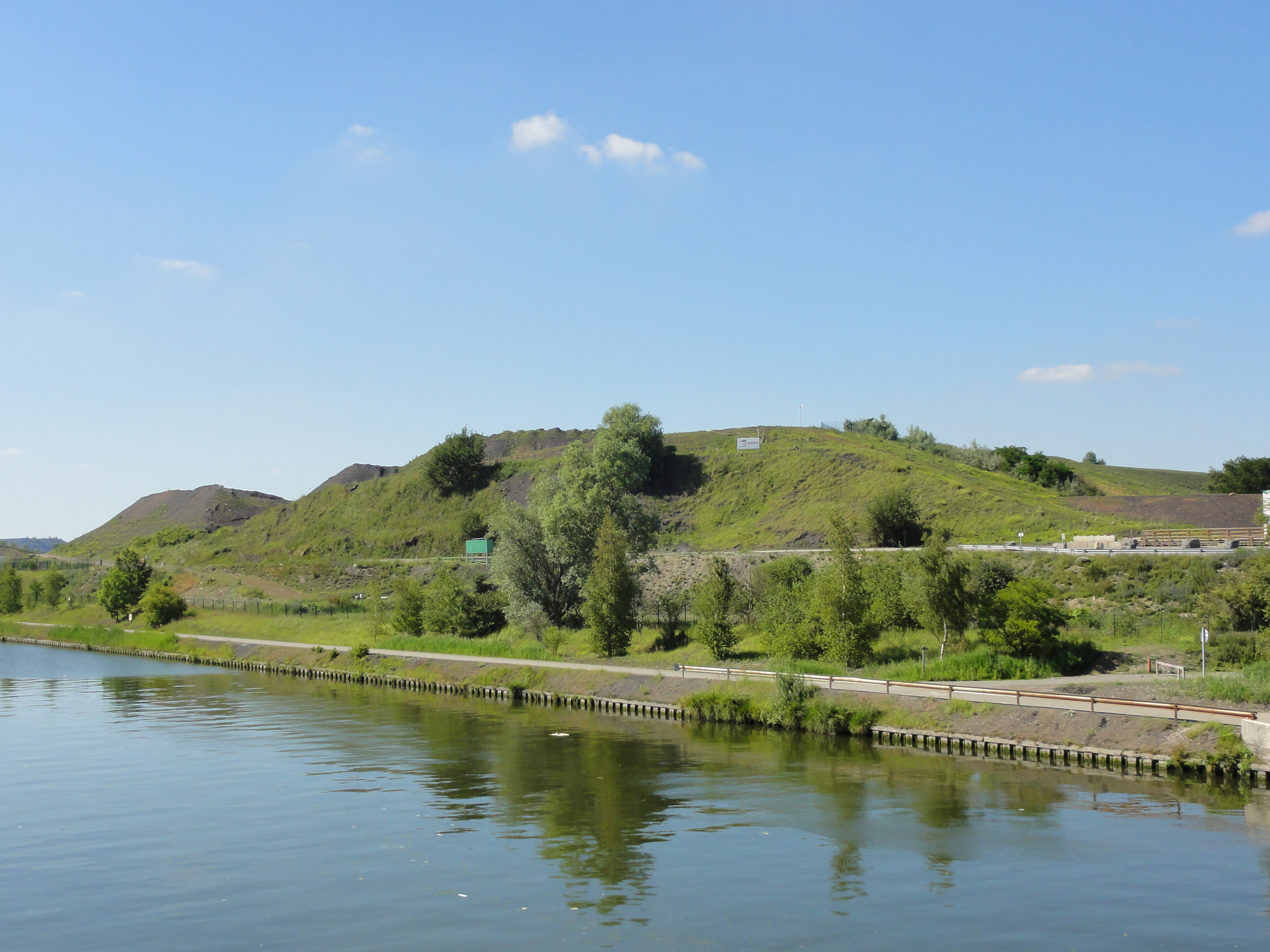 Terril n° 113 dit 8 de Dourges Sud, fosse n° 8 - 8 bis de la Compagnie des mines de Dourges dans le bassin minier du Nord-Pas-de-Calais, Évin-Malmaison, Pas-de-Calais, Nord-Pas-de-Calais, France.